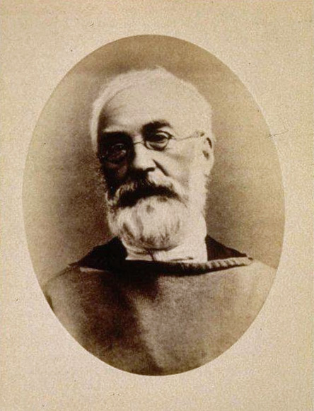 Louis Charles Auguste Steinheil. 1890. Bibliothèque nationale et universitaire de Strasbourg